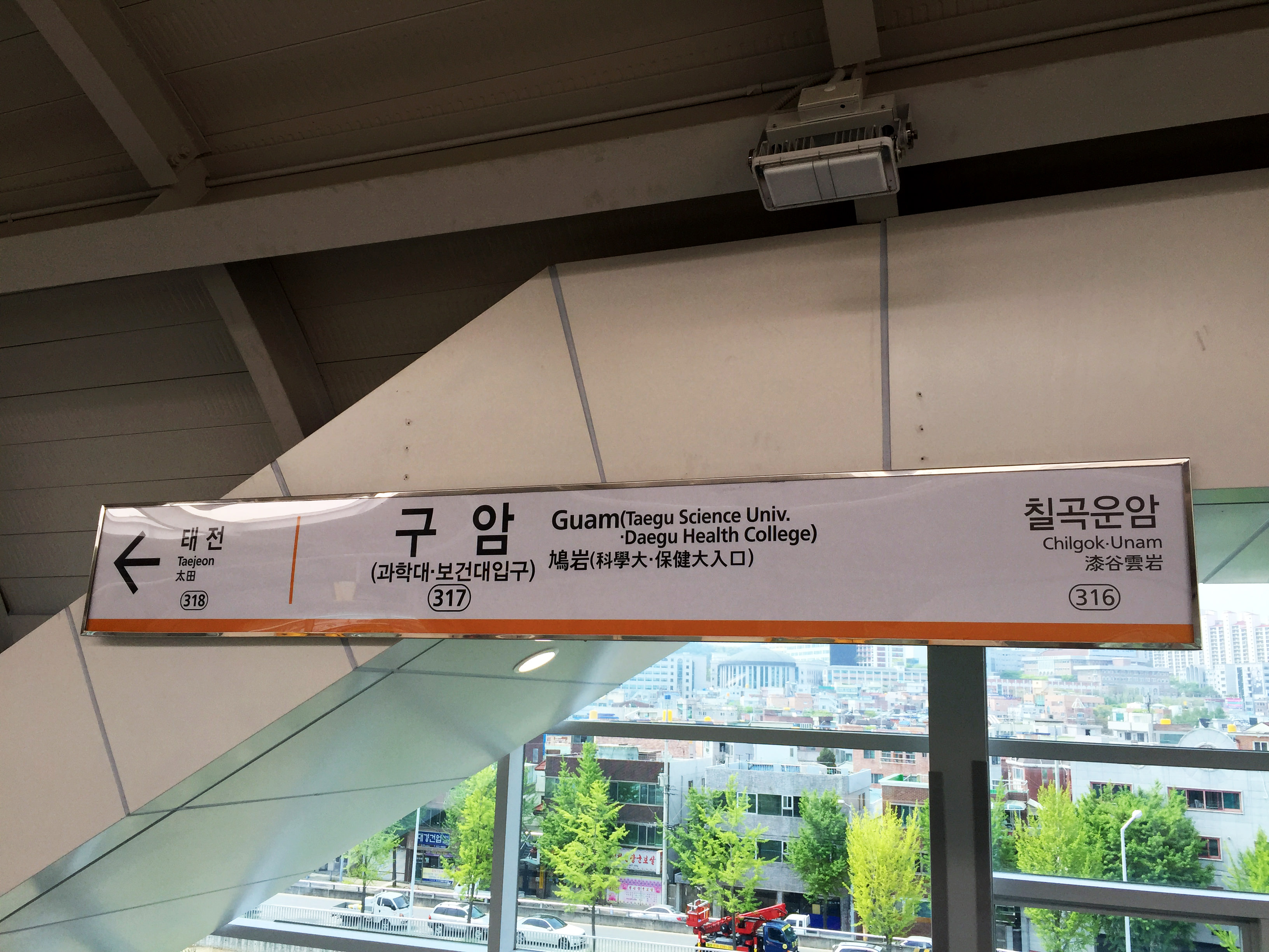 구암(과학대·보건대입구)역 역명판